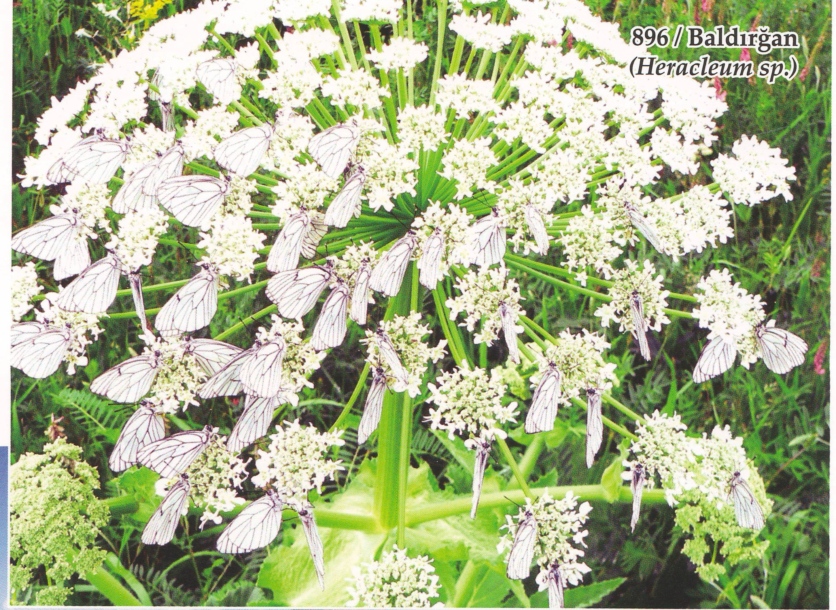 Baldırğan